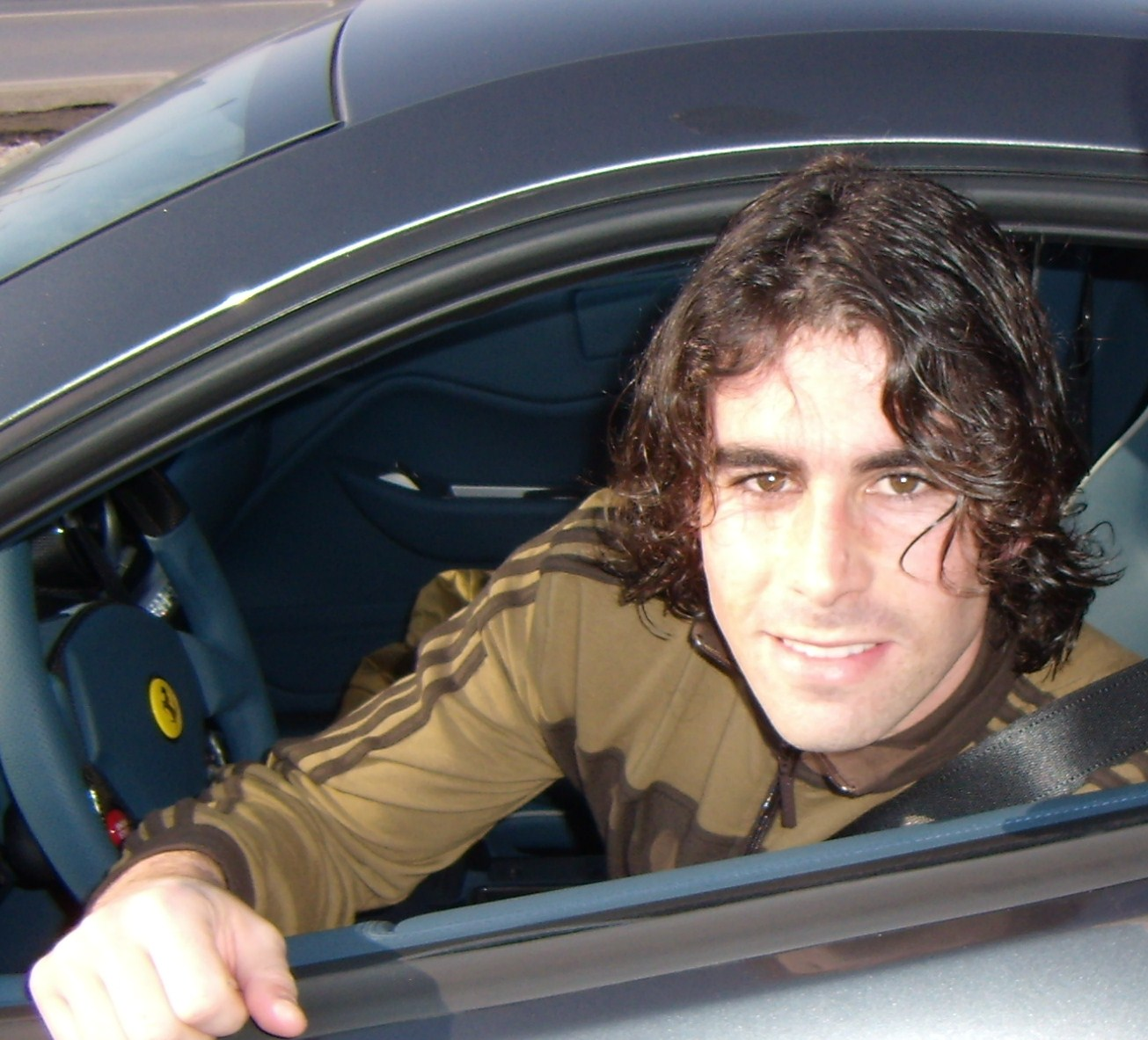 Opera propria